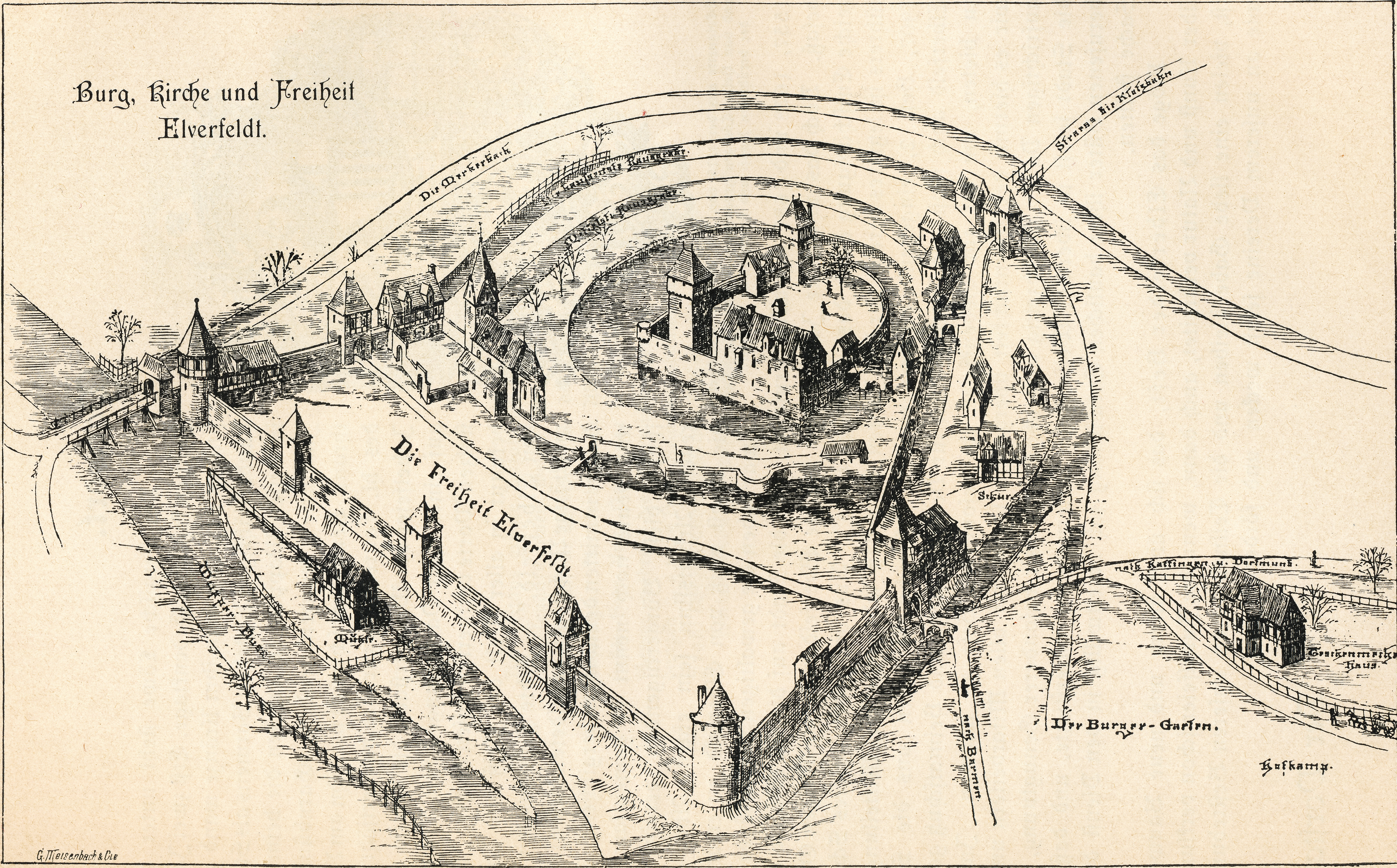 Burg, Kirche und Freiheit Elverfeldt Rekonstruktionszeichnung von G. A. Fischer (1833–1906) aus dem Jahre 1893 nach dem Grundrisse, den Johannes von der Waye 1598 aufnahm